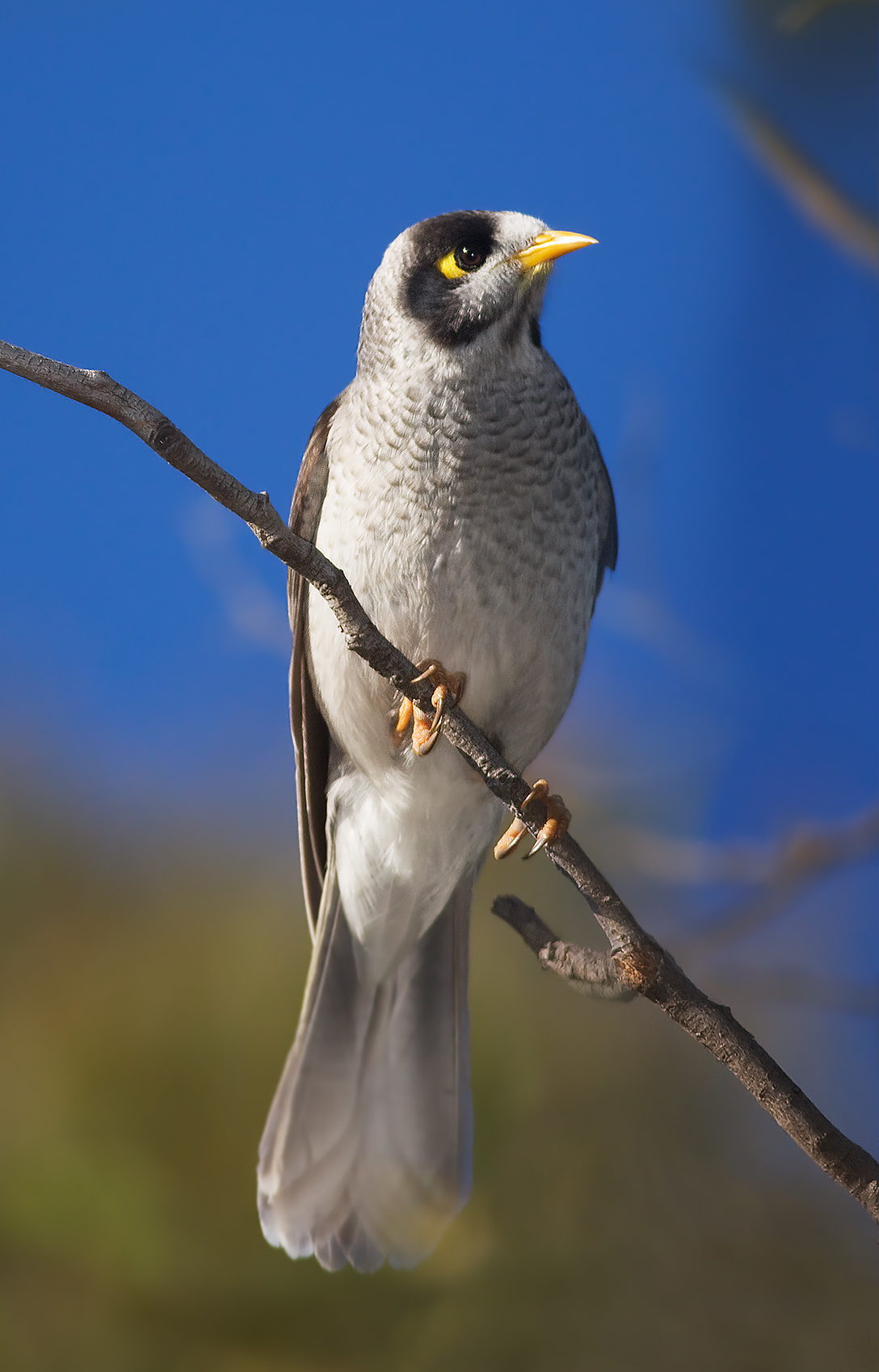 1.2 only